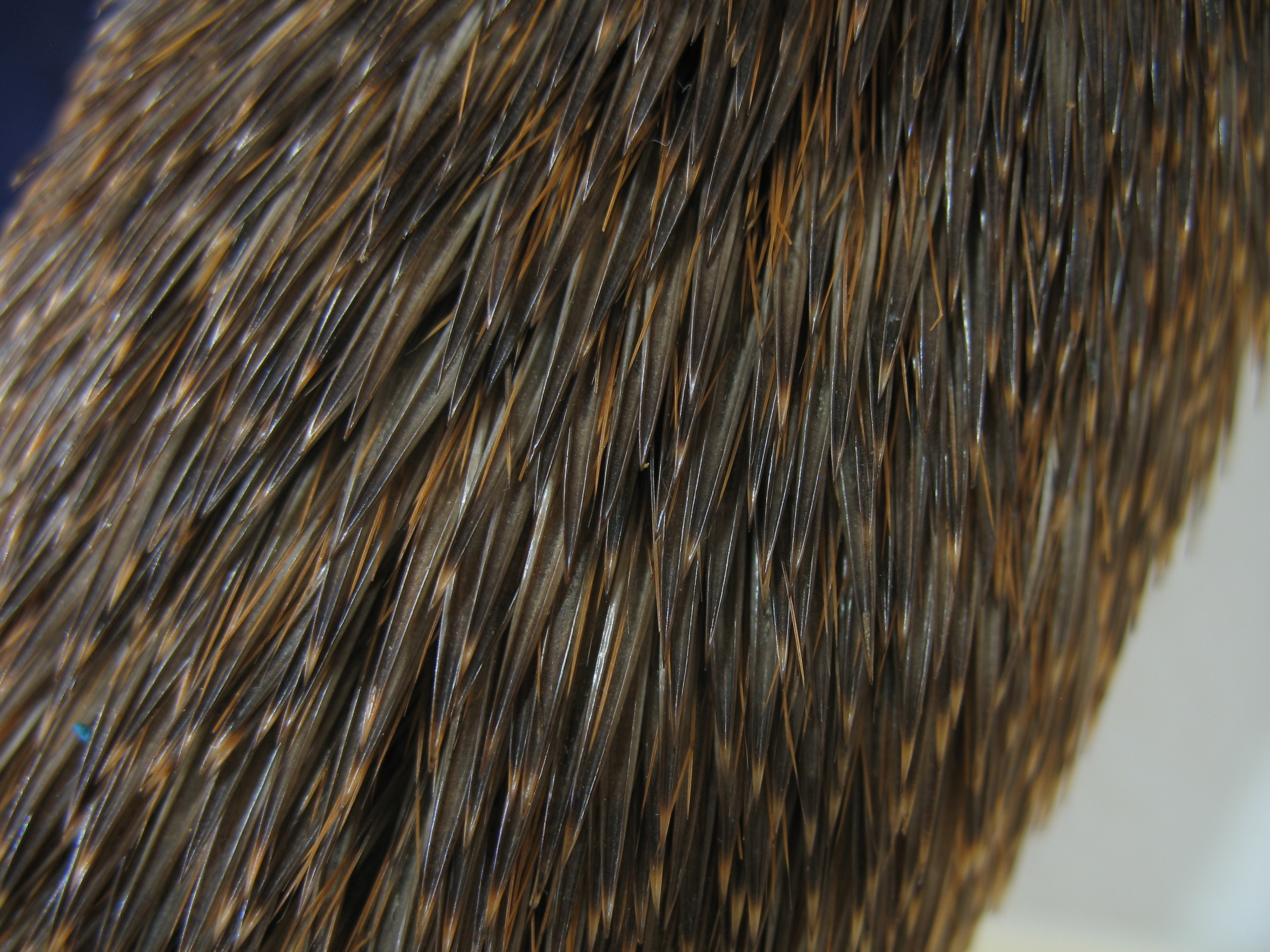 Se muestra una parte de la porción dorsal de la rata espinosa Mesomys (Echimyidae). Pueden verse pelos en su estado normal y otros transformados en espinas.